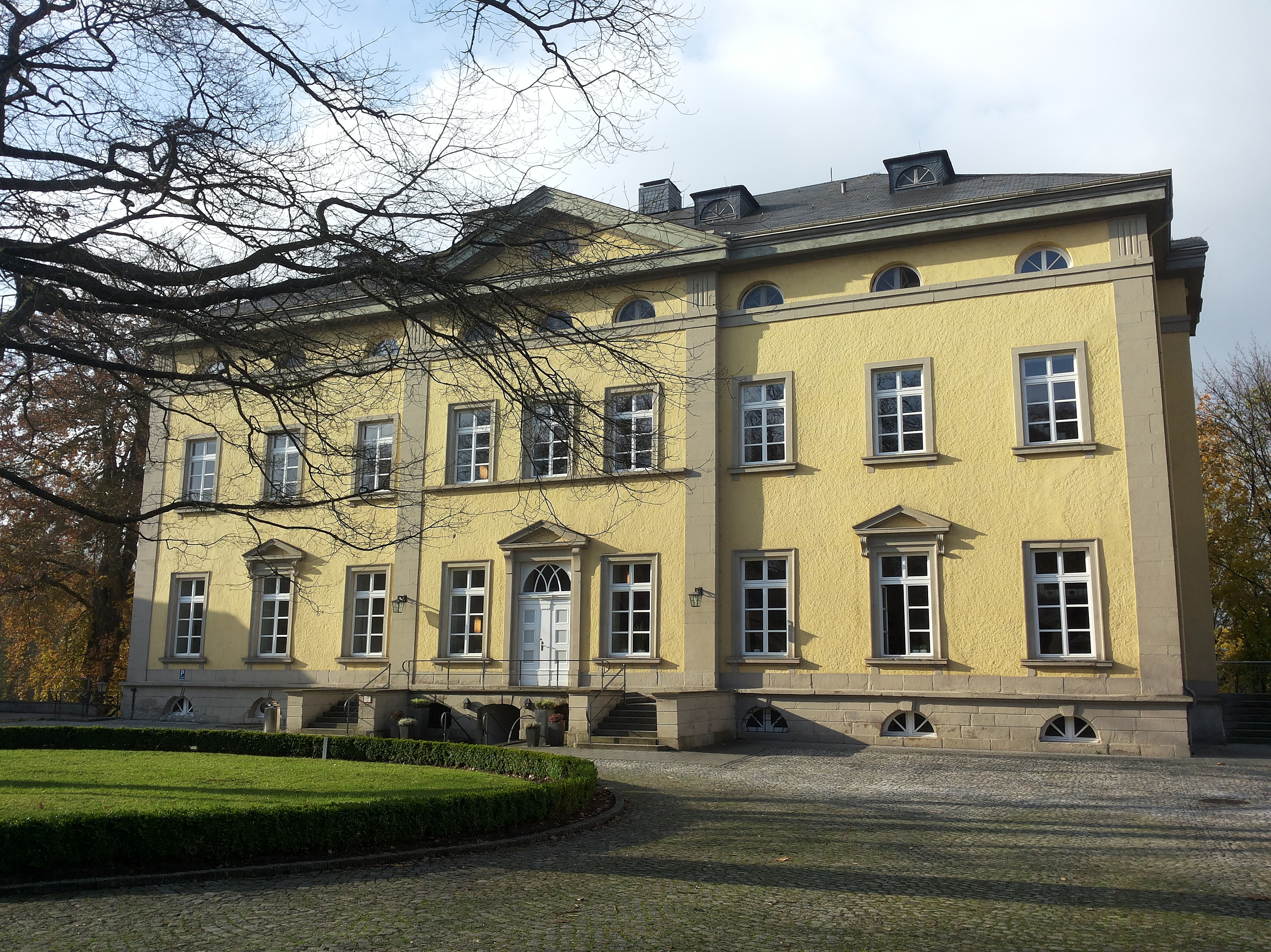 Haus Villigst in Schwerte-Villigst (Germany)